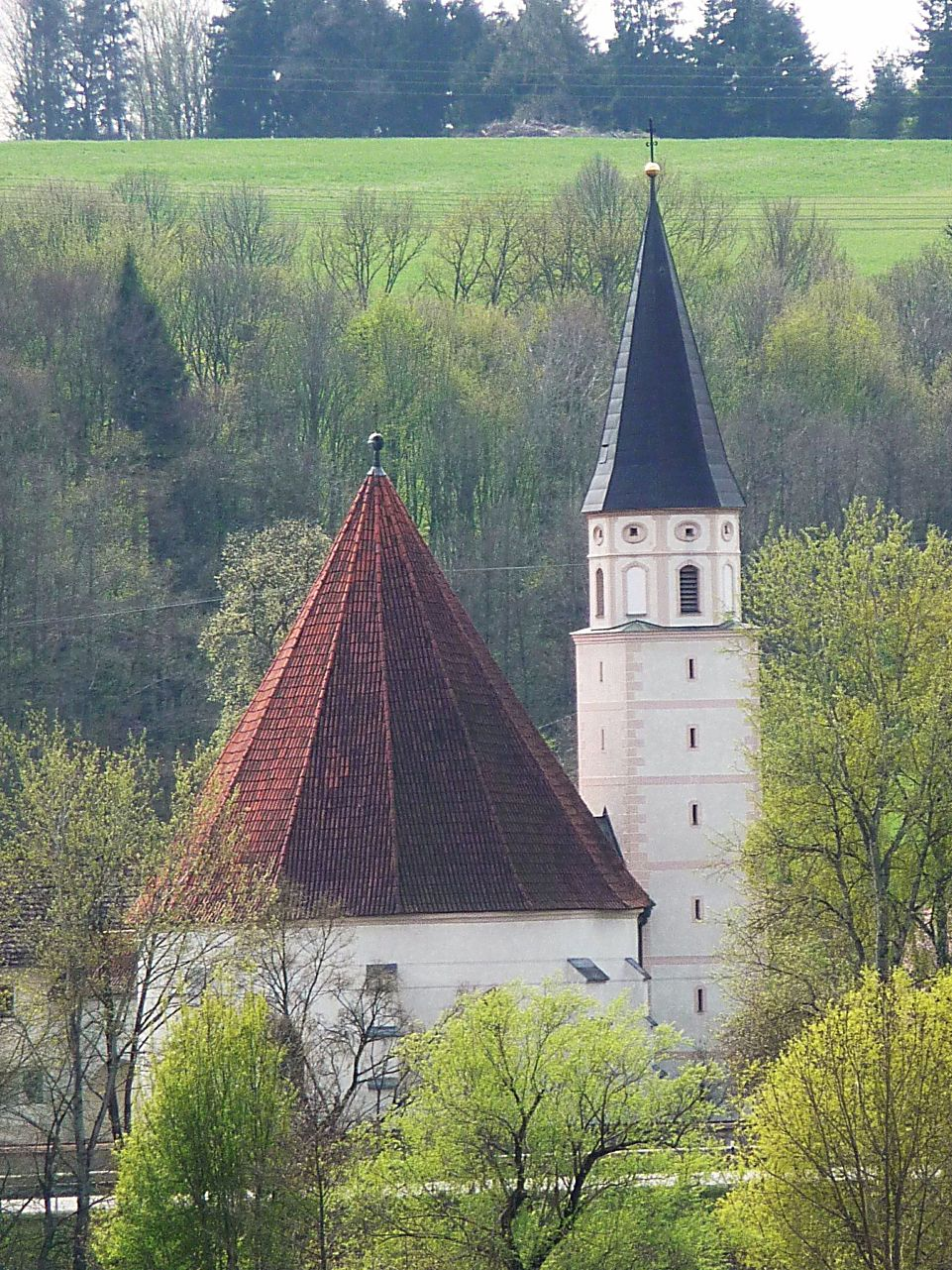 Die Nebenkirche St. Magdalena in Hausbach